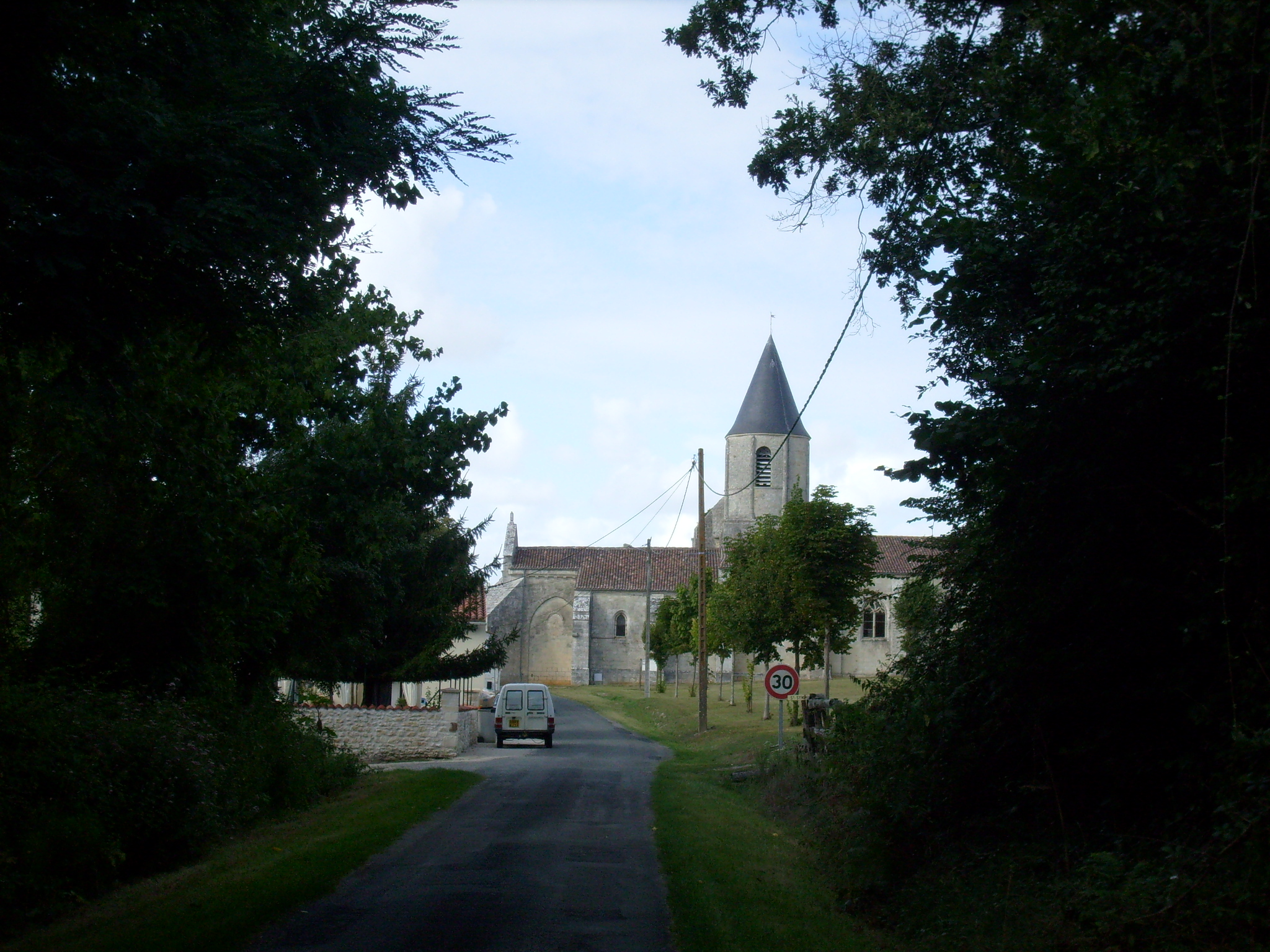 L'entrée du village de La Gripperie-Saint-Symphorien